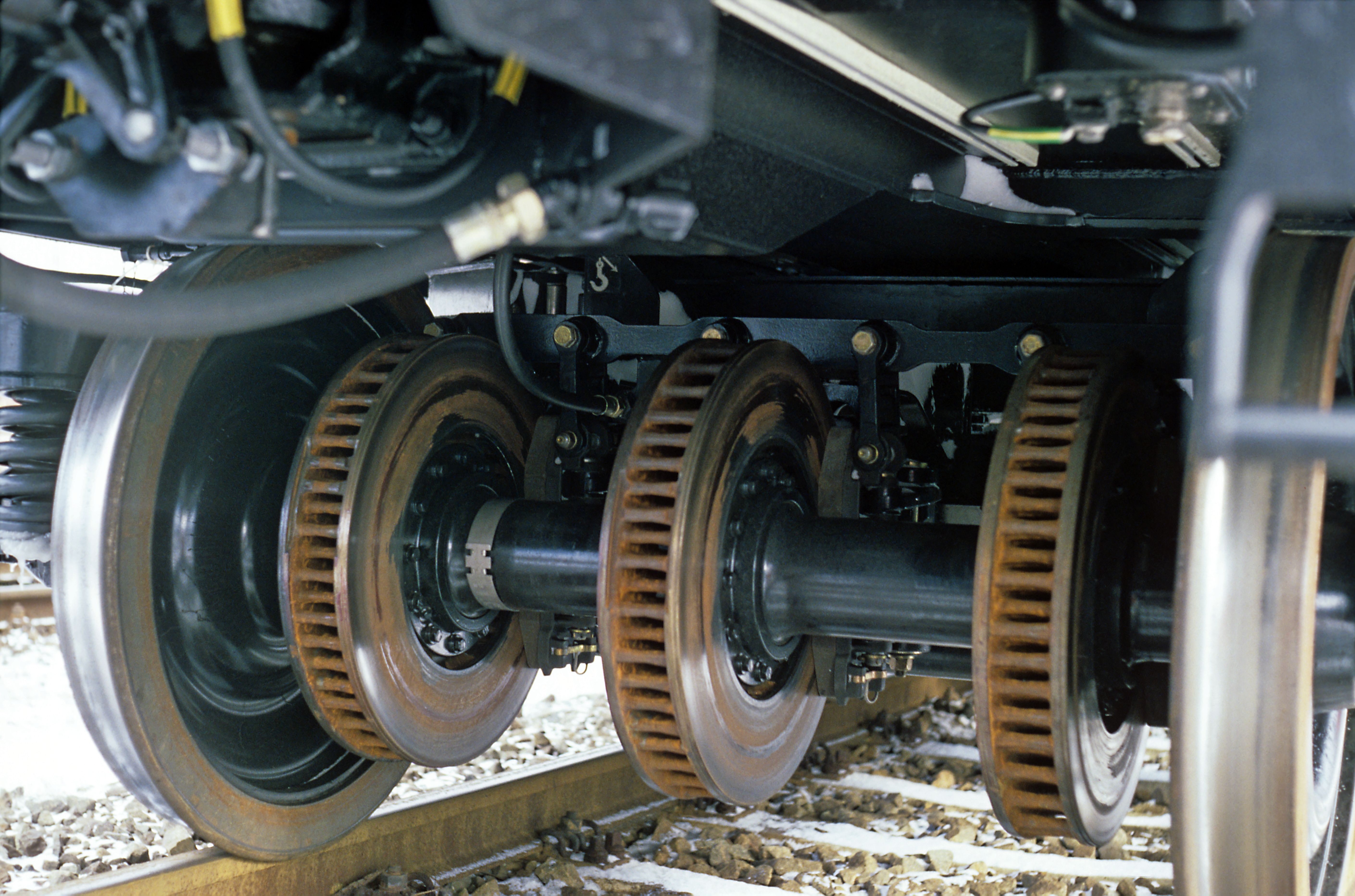 Radsatz eines »Meridian«-Mittelwagens mit drei Bremsscheiben, eingebaut in ein Drehgestell der Bauart Görlitz VIII